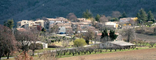 Village of Auribeau, Vaucluse, France